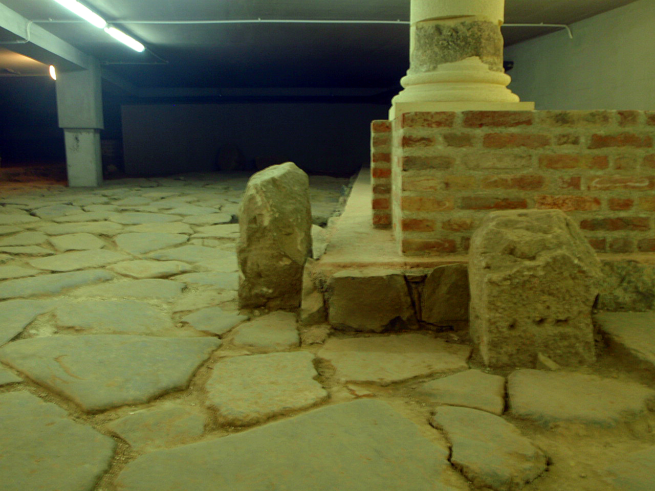 Szombathely, Borostyánkő út feltárt szakasza egy kereszteződésben a Savaria területén, a mai Fő tér alatt. Megtekinthető üvegpadlón át a Fő téri OTP Bank fiókban.